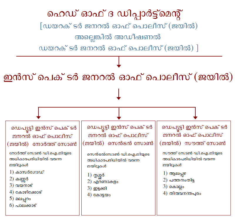 കേരളത്തിലെ ജയിലുകളുടെ നടത്തിപ്പിന്റെ വിവിധതലങ്ങളെ കാണിക്കുന്ന ചിത്രം.